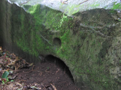 Чашеобразная лунка над входным отверстием дольмена на урочище 3 дуба. Диаметр лунки около 10 см. Неподалеку стоит чашечный камень с 2 крупными углублениями. Р-н. Дагомыса, урочище "3 Дуба".